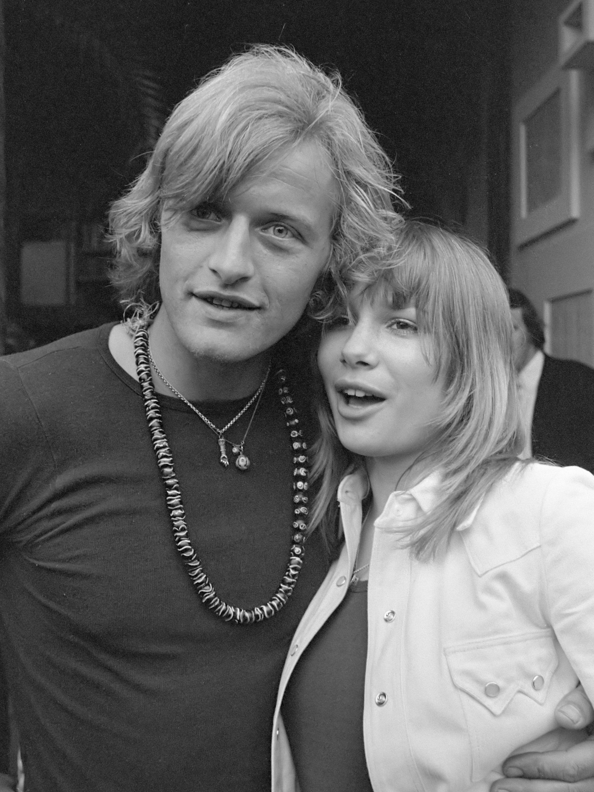 Verfilming van Turks Fruit (naar de roman van Jan Wolkers uit 1969) door Paul Verhoeven. Hoofdrolspelers Rutger Hauer en Monique van de Ven 7 juni 1972